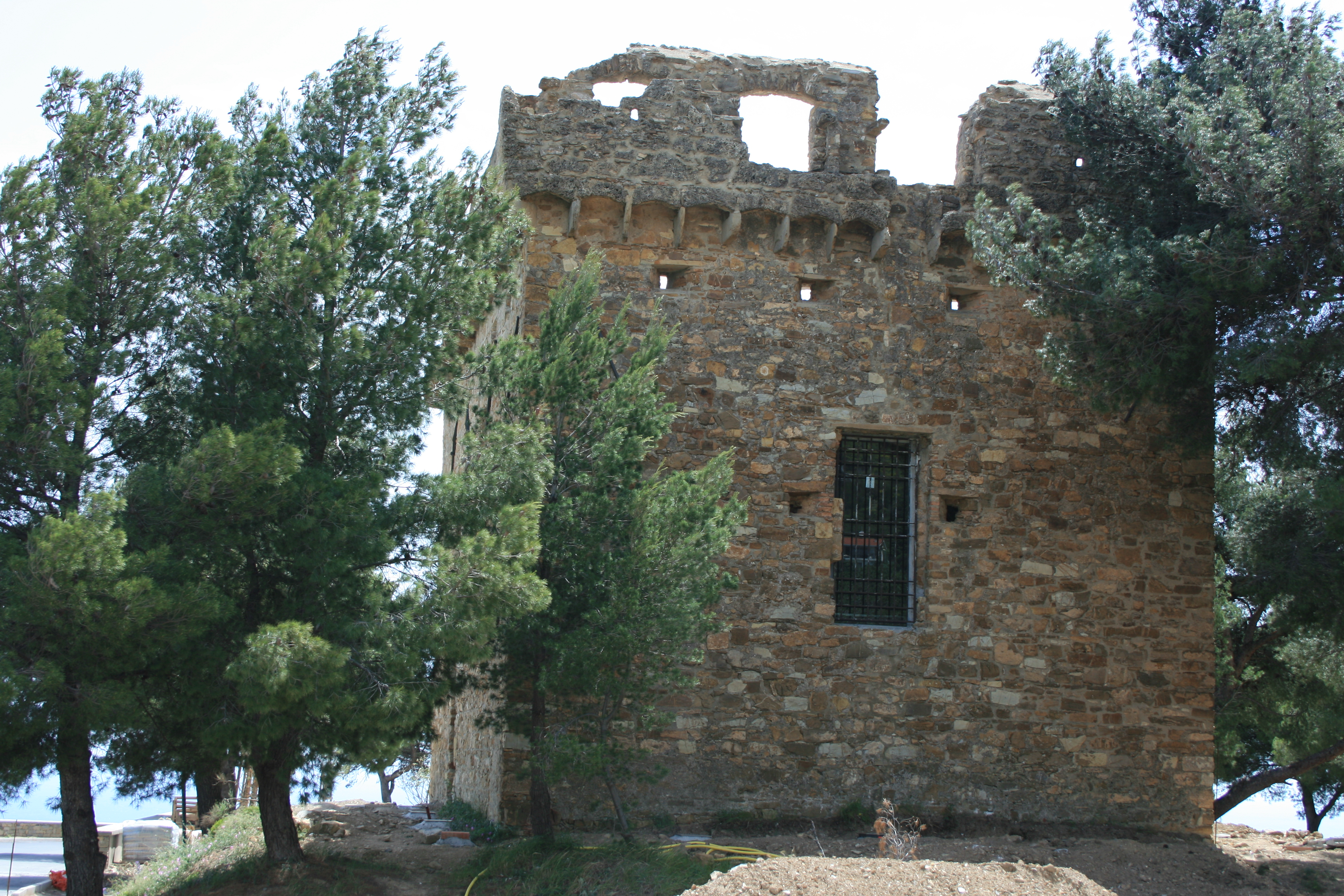 Sarazena Torre Gallinara a Cipressa (IM), Liguria, Italia